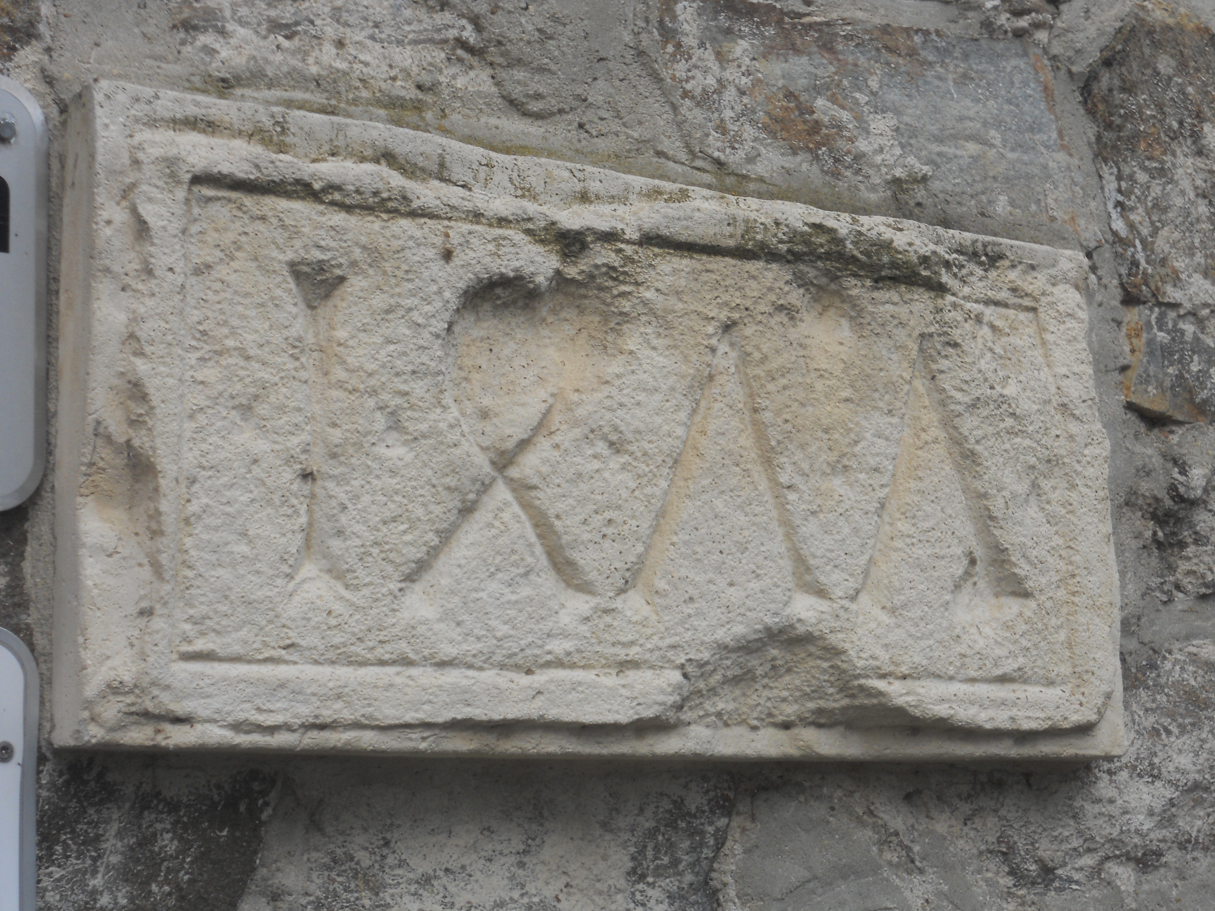 Linzer Tor, Tafel mit der Inschrift "1477" (Erbauungsjahr)